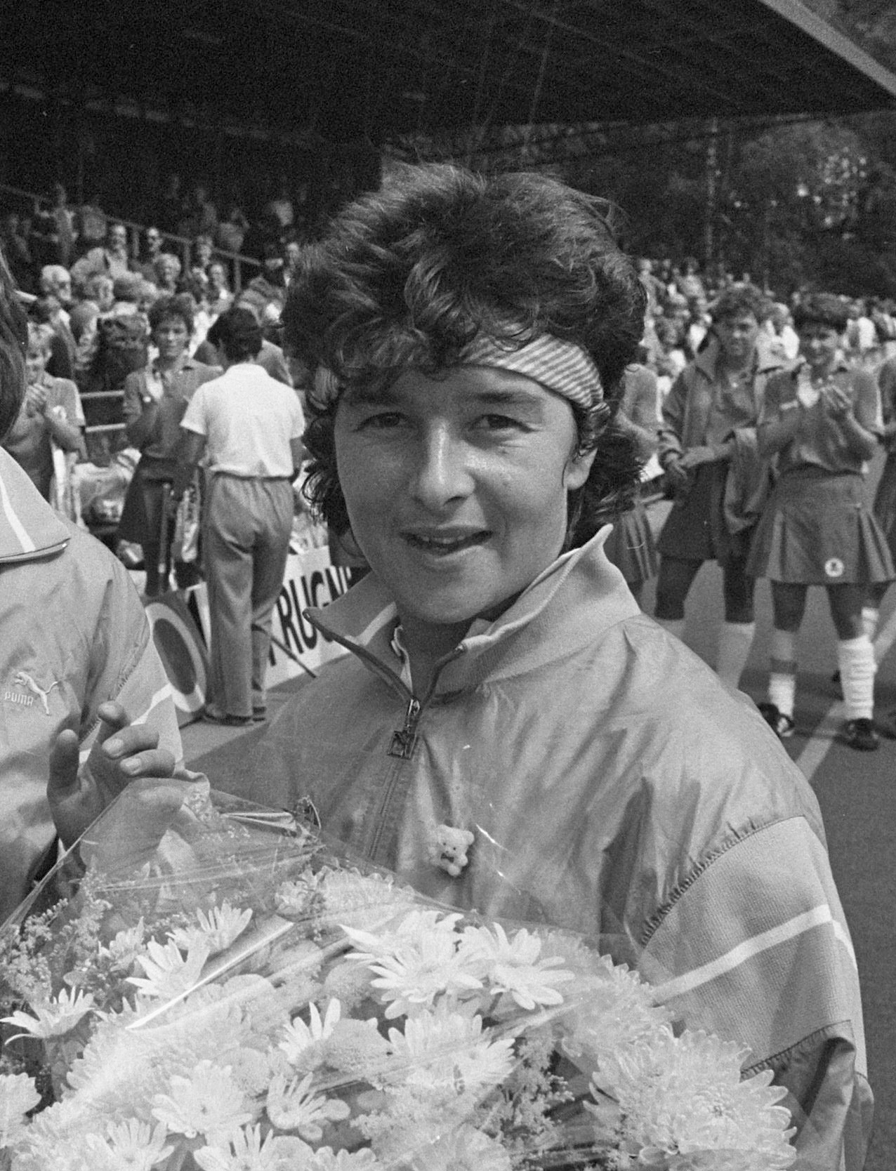 Wereldkampioenschappen hockey dames: Nederland-Canada; Sandra Le Poole in de bloemetjes vanwege 100ste interland